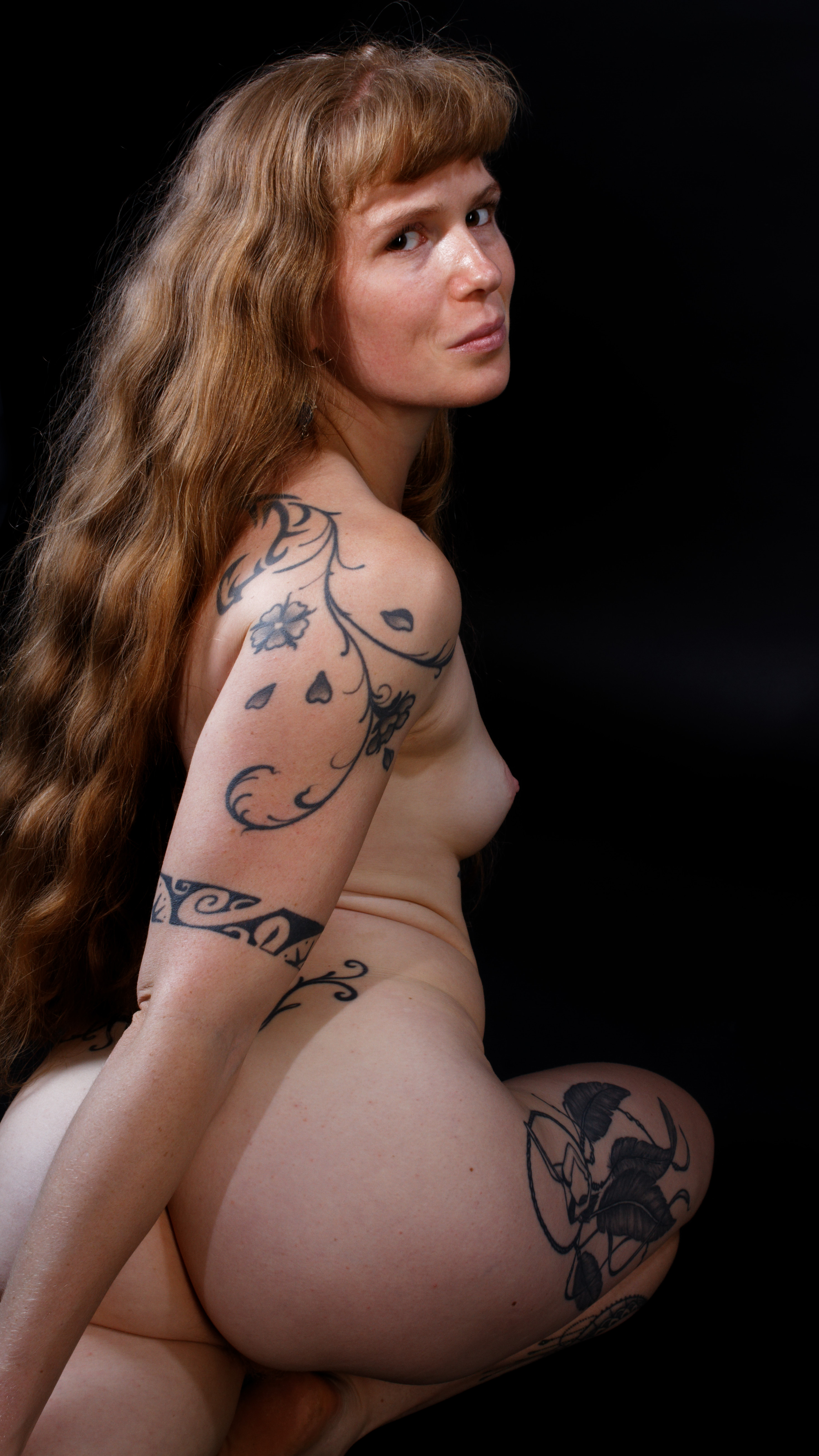 טקס חלוקת תארים MD